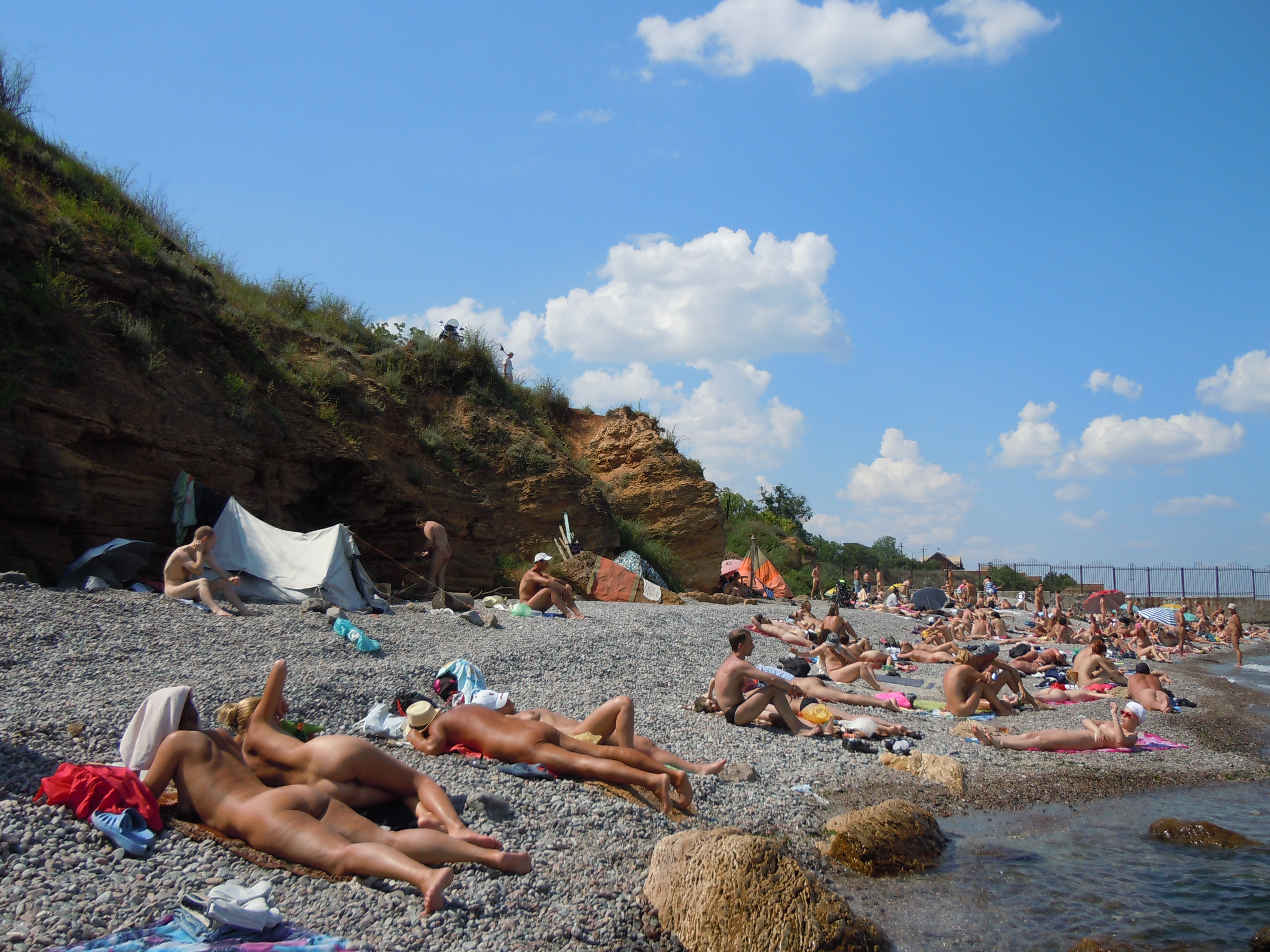 Дикий пляж в Одесі